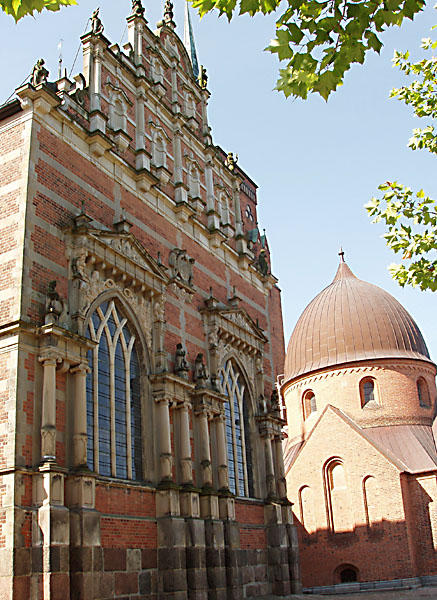 Roskilde Domkirke -Chr. 4,s kapel